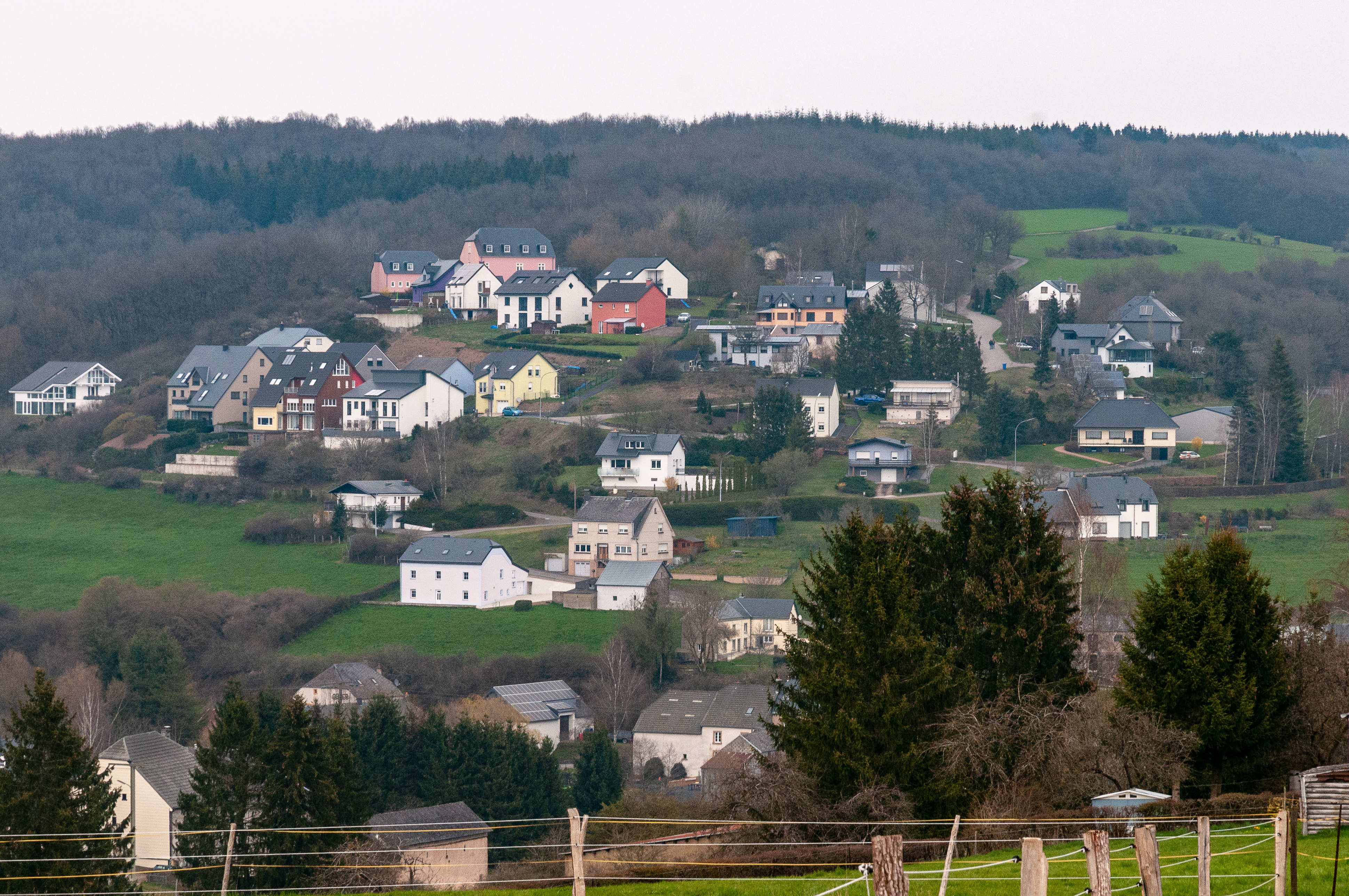 Vue op Sir vun der Rue des Carrières.